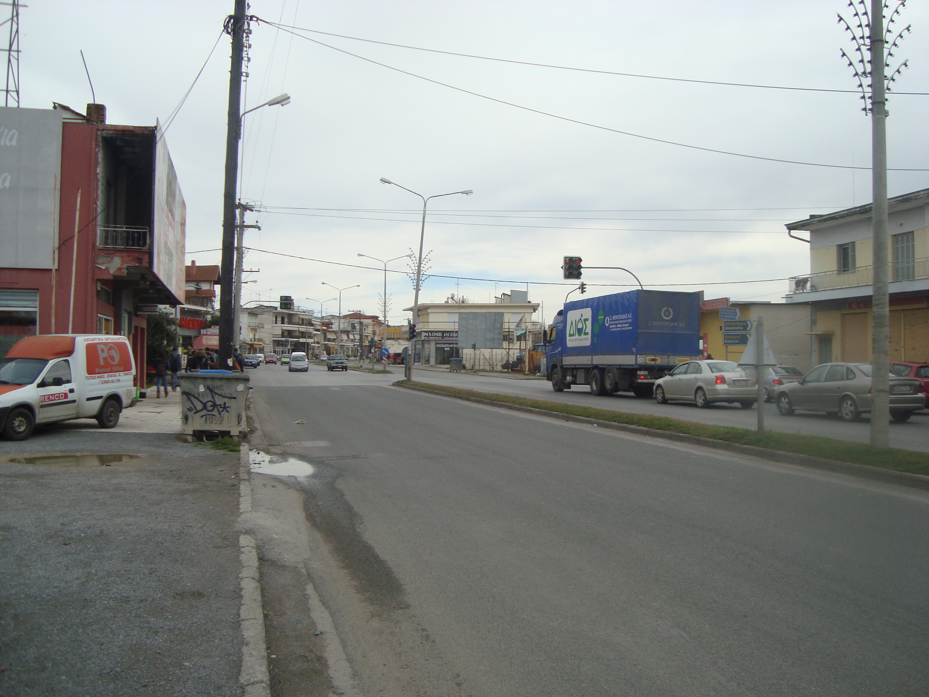 Η Εθνική Οδός 2 στα Γιαννιτσά